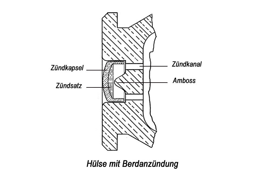 Schnittbild Patrone mit Berdan Zündung